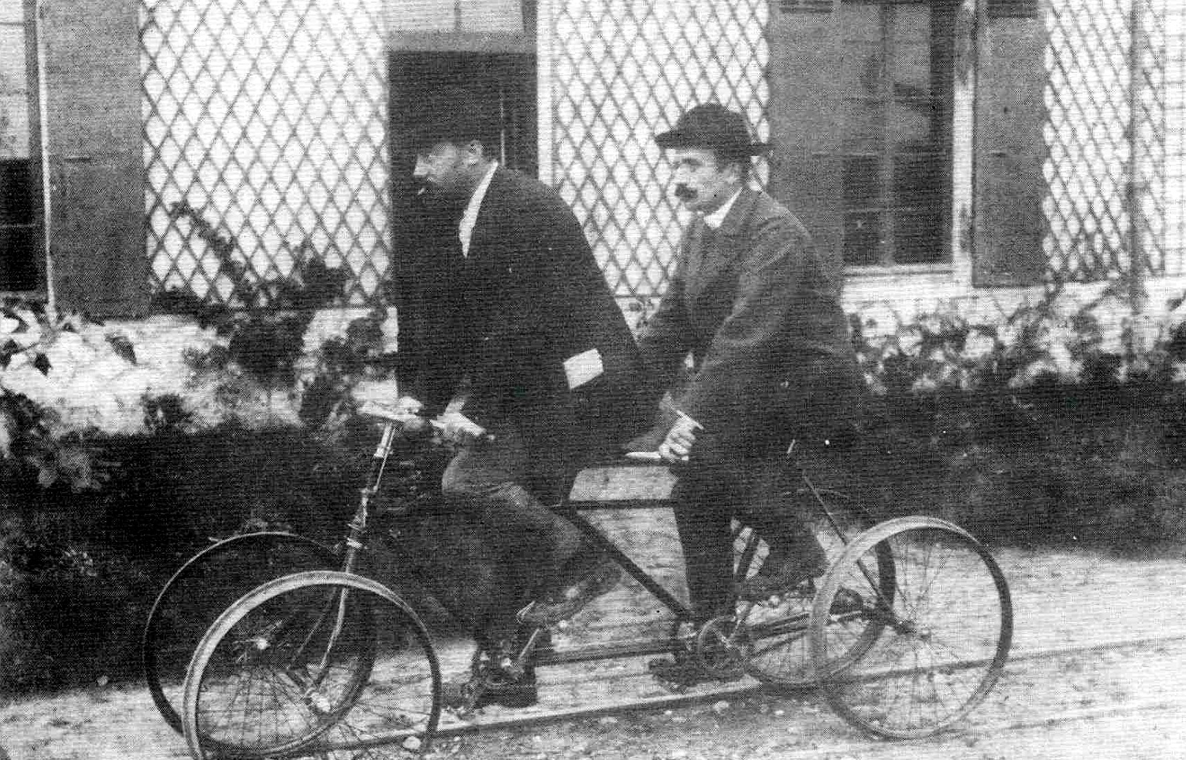 Quadricycles-tandem pour parcourir le parc agricole d'Achères